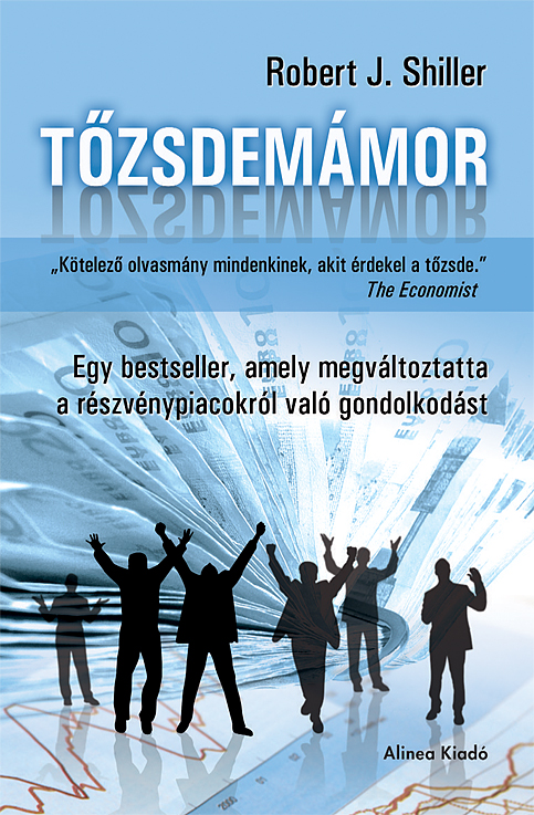 A Tőzsdemámor c. könyv magyar nyelvű kiadásának borítója